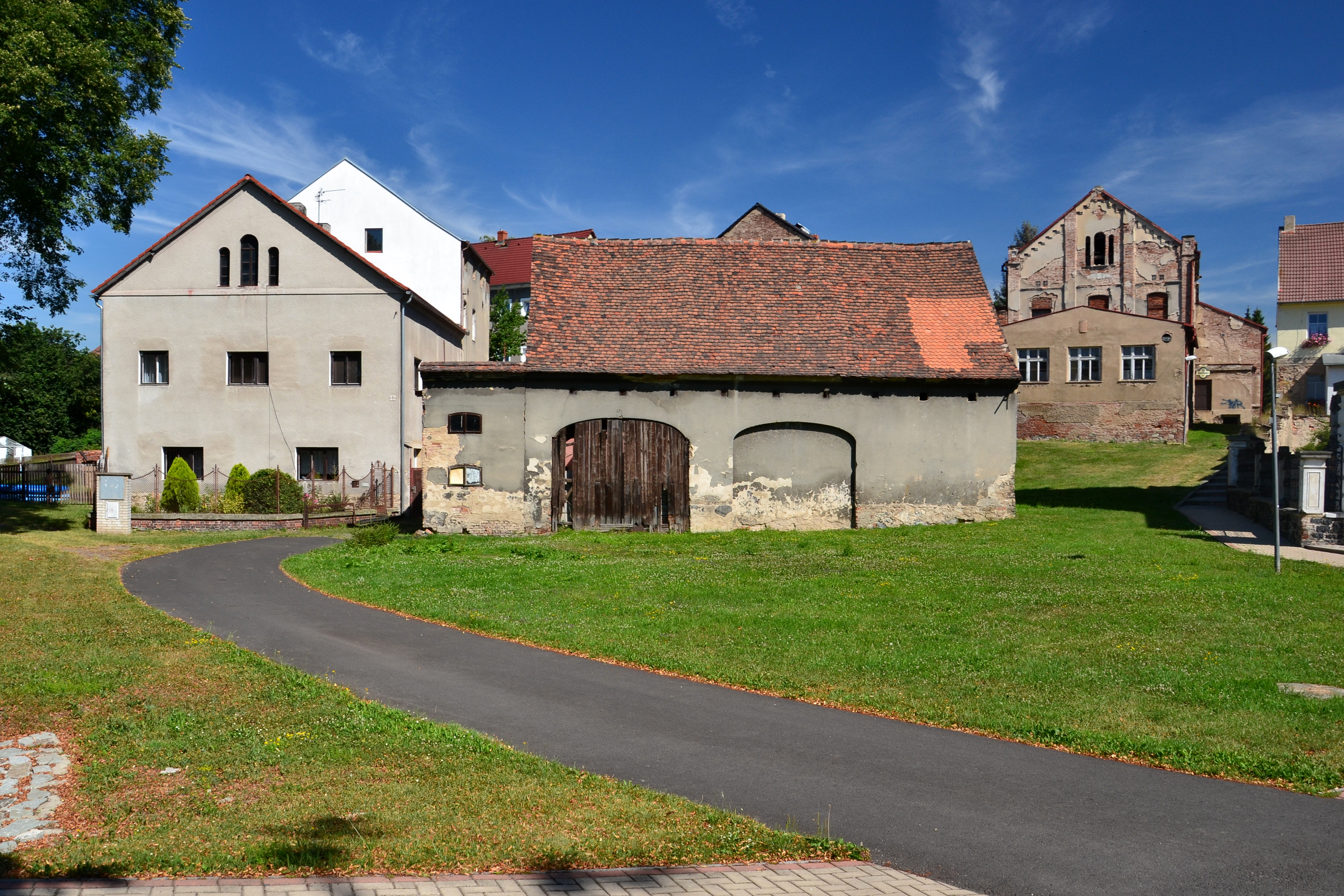 Usedlost čp. 12 na návsi